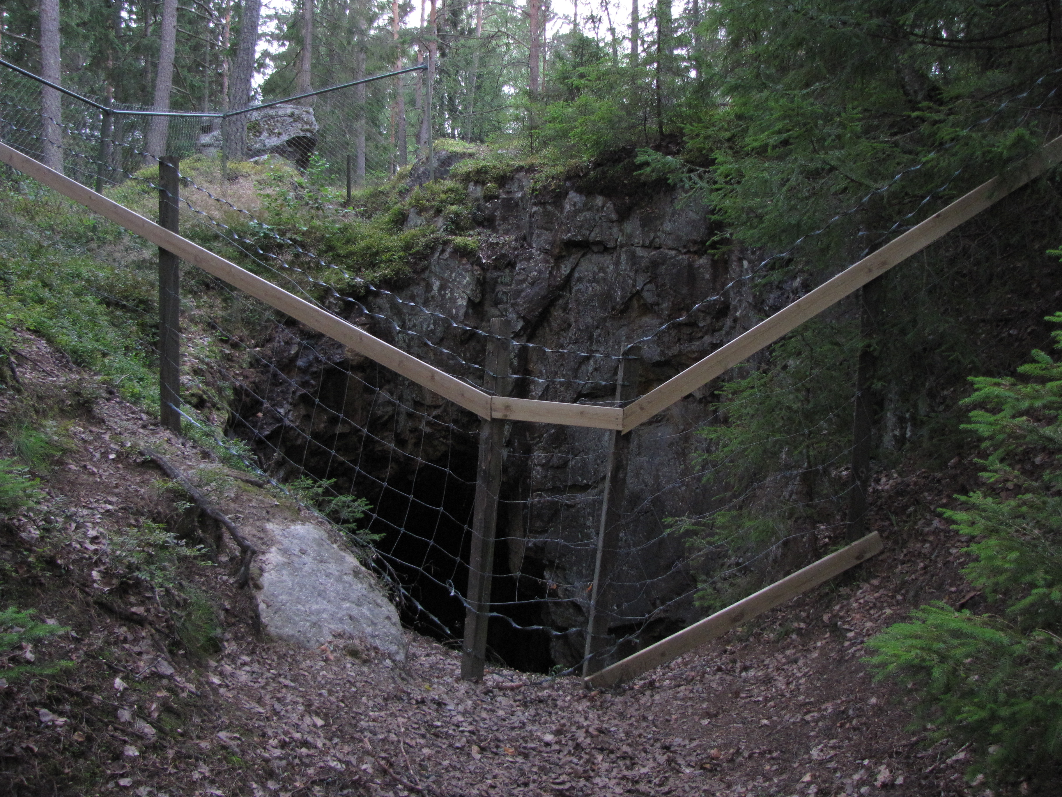 Alsgruvan, schaktet uppifrån från utsidan. Det var detta schakt som flitigt användes i SVT's serie "Morden".